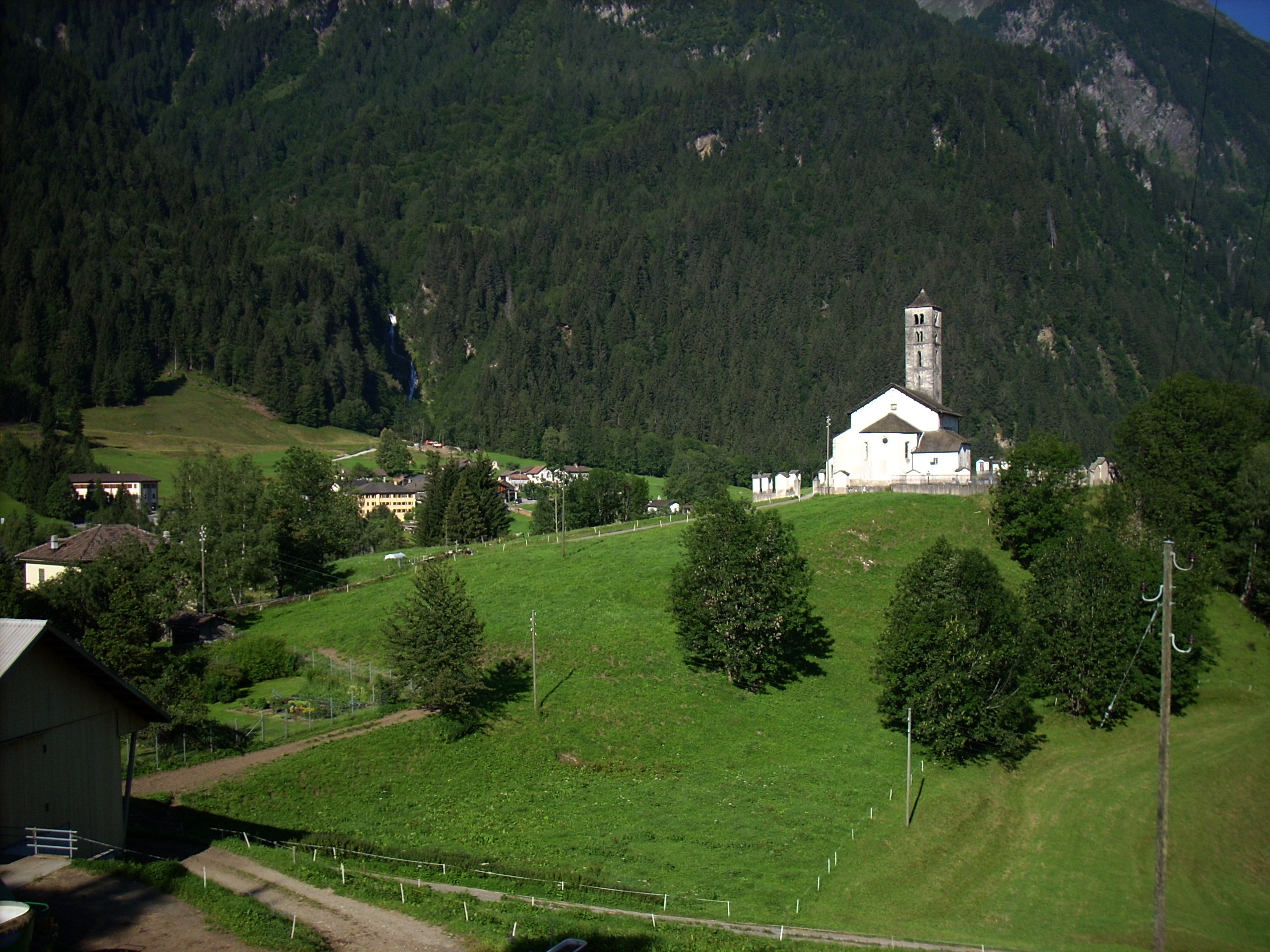 Prato Leventina, chiesa Foto Roberto Janner